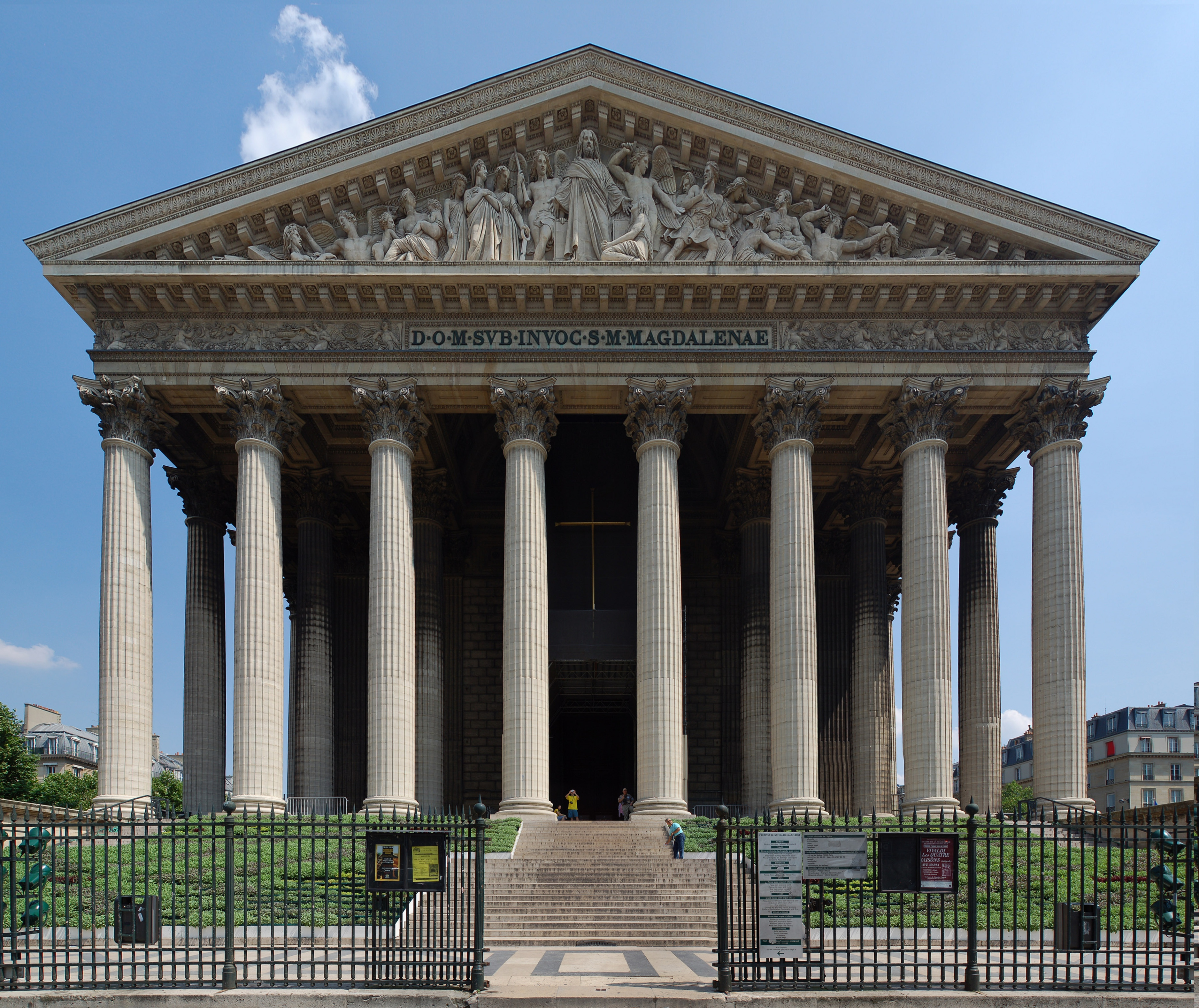 Vue extérieure de l'église de la Madeleine, Paris